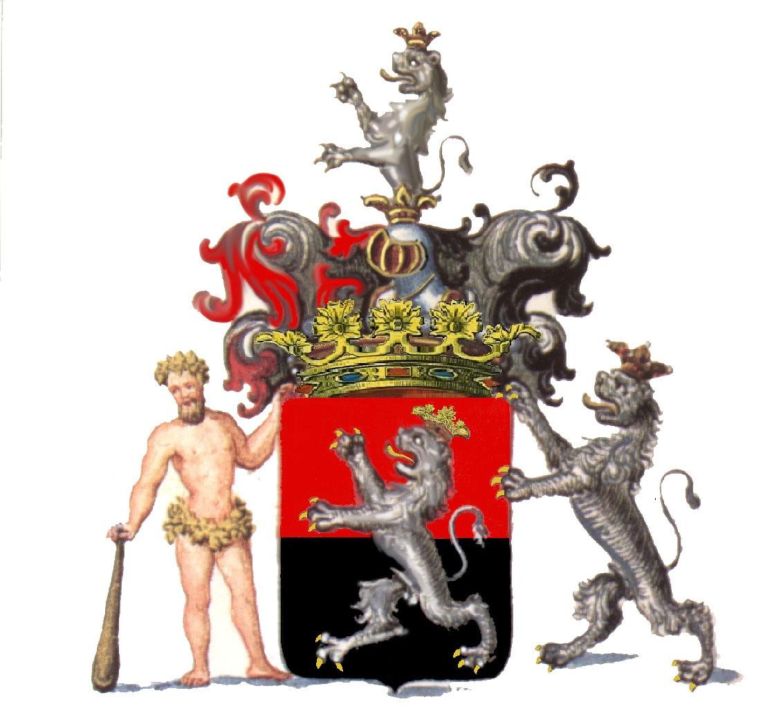 Coupé de gueules sur sable au lion d'argent couronné, armé, lampassé d'or.